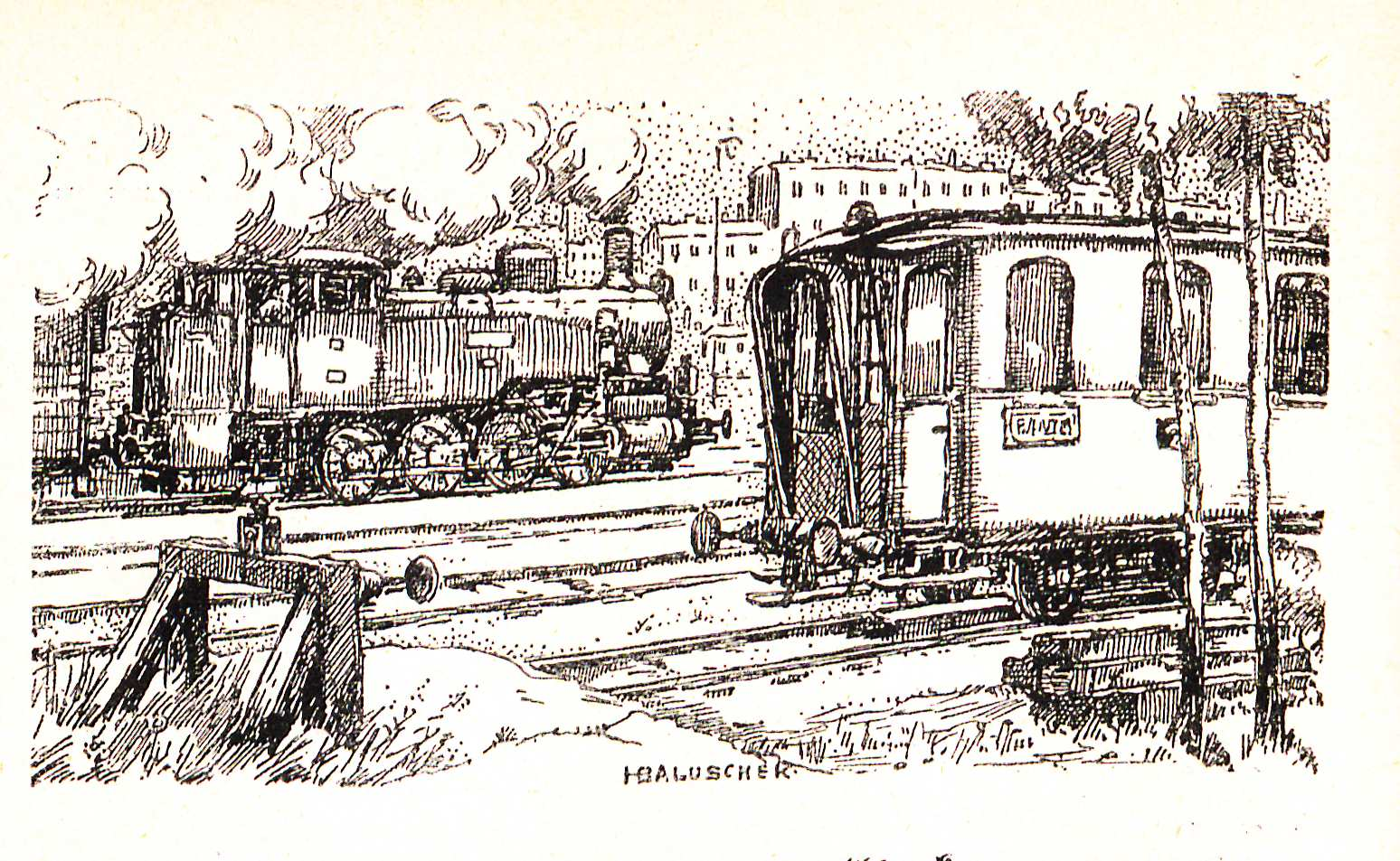 BC4ü und der alte Herr Prellbock, S. 26